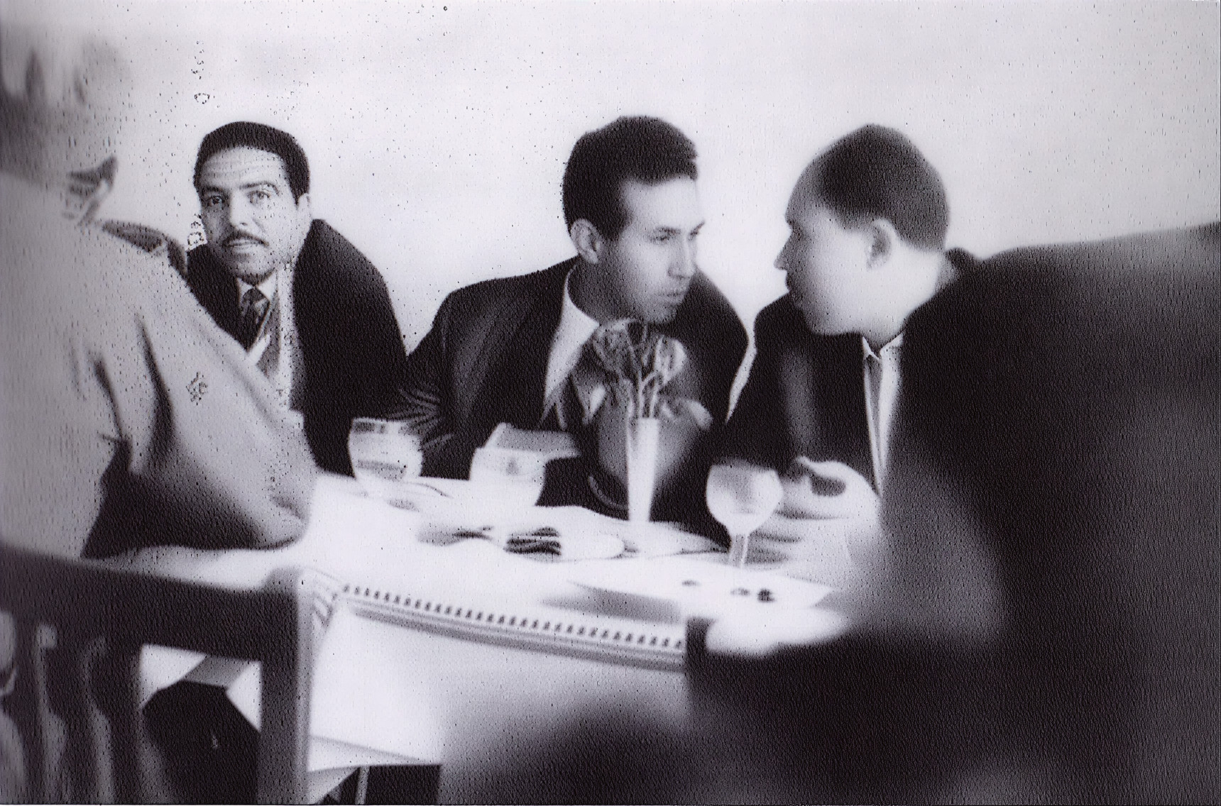 Au congres de Tripoli Cdt Ahmed Bencherif - BenBella - Cdt Mostéfa Merarda